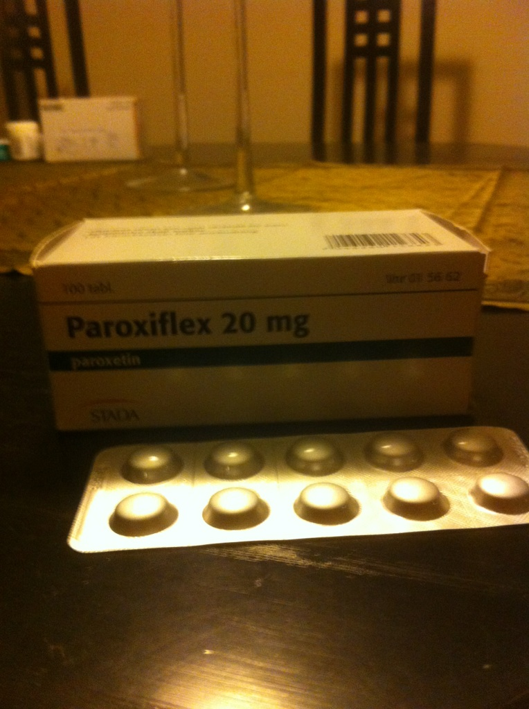 Paroxetin 20 mg